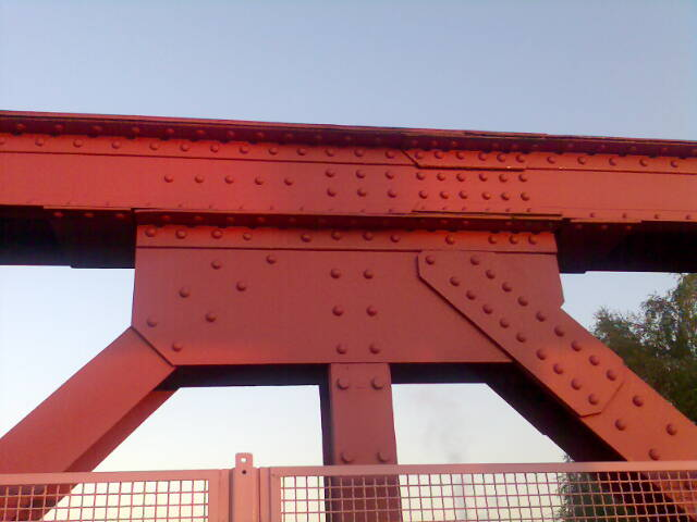 Genietetes Knotenblech innerhalb einer Stahlkonstruktion